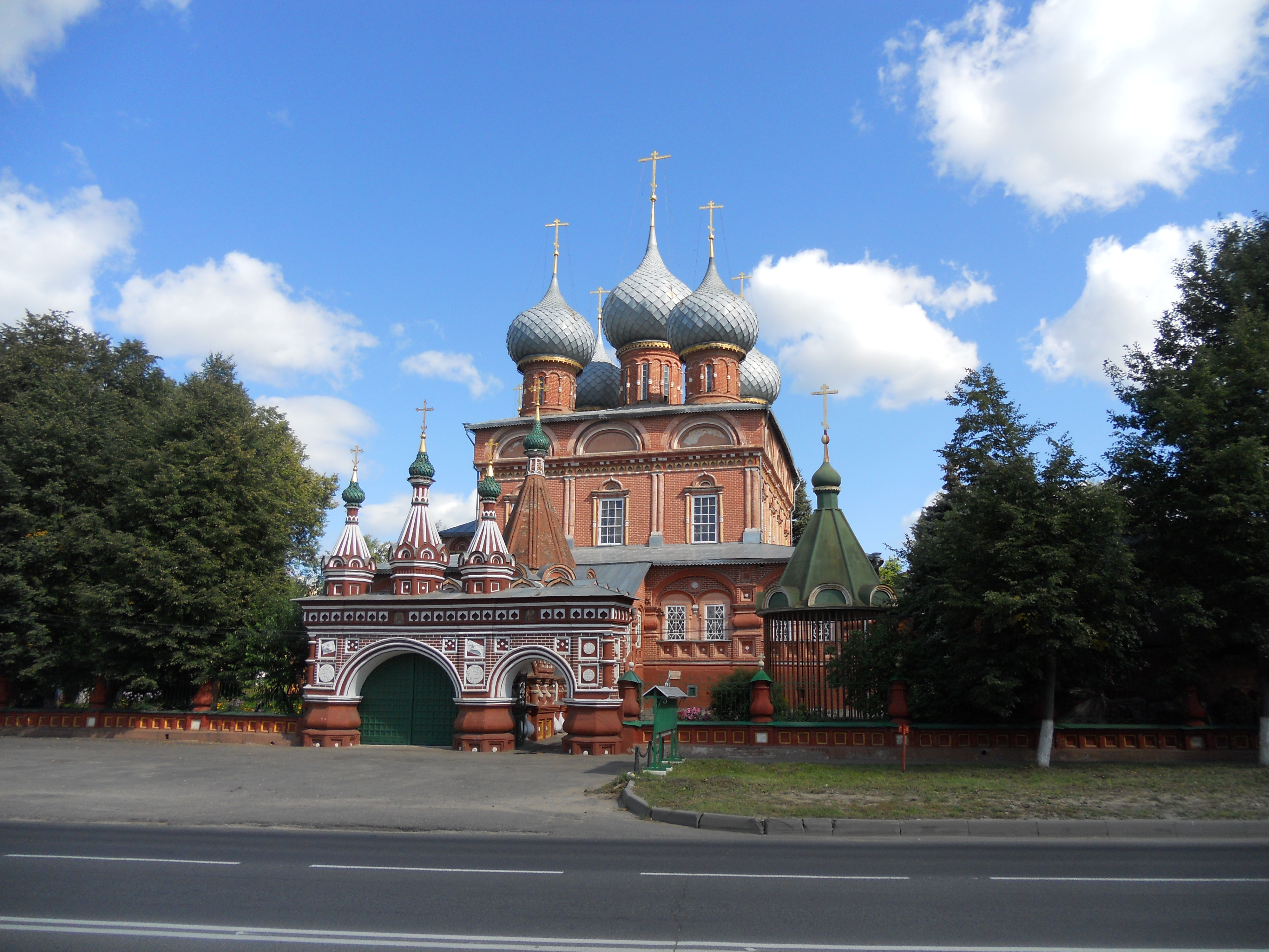 Церковь Воскресения на Дебре (Знаменский Храм) в Костроме